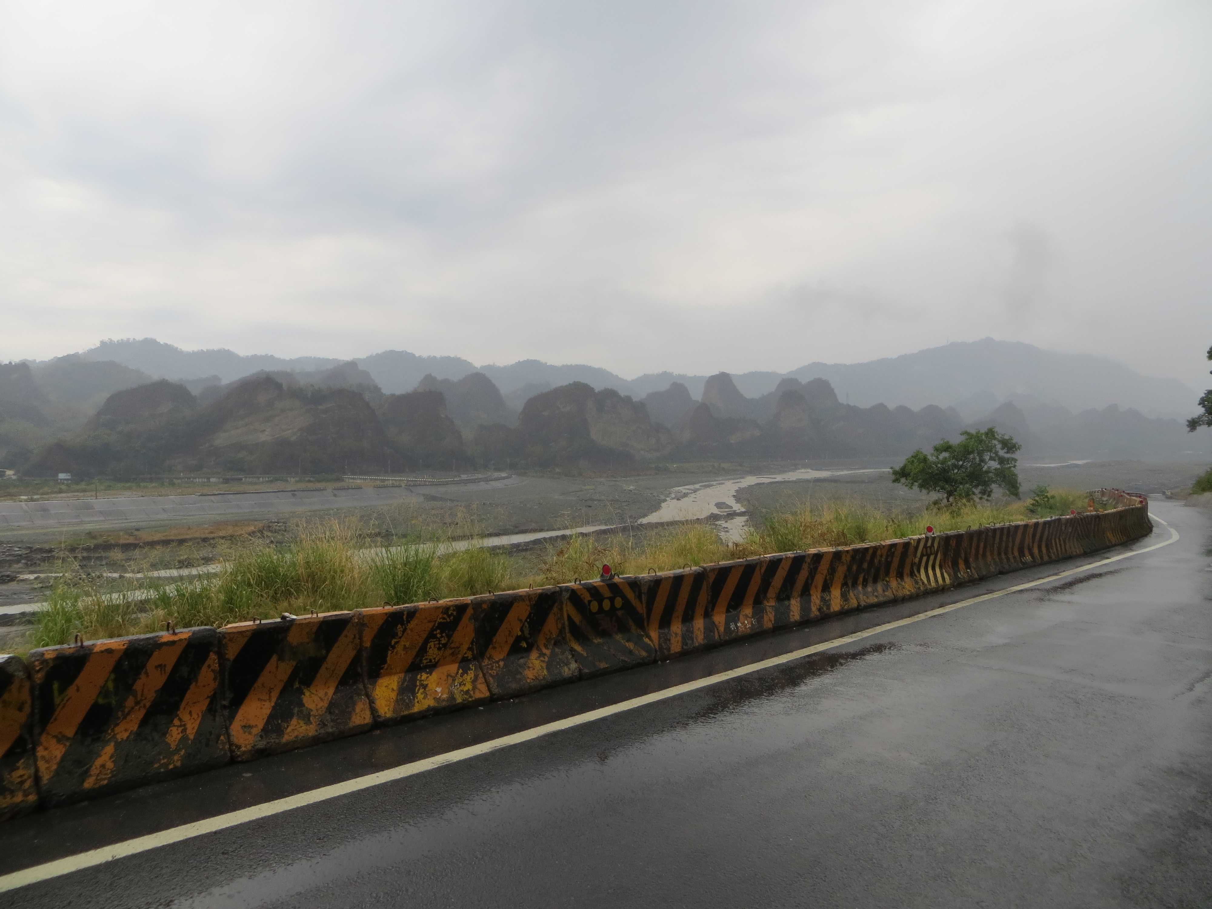 中文（台灣）: 台27線有一段因八八風災而出現的大崩塌處，而有了廣大視野，可遠眺荖濃溪對面十八羅漢山。